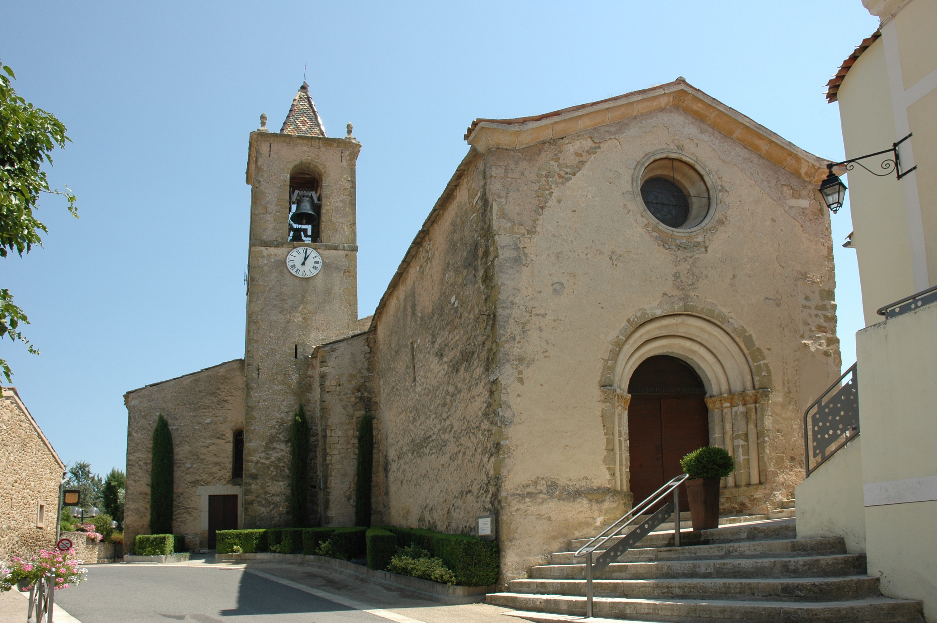 Église Notre Dame et Saint Martin (Cruis)